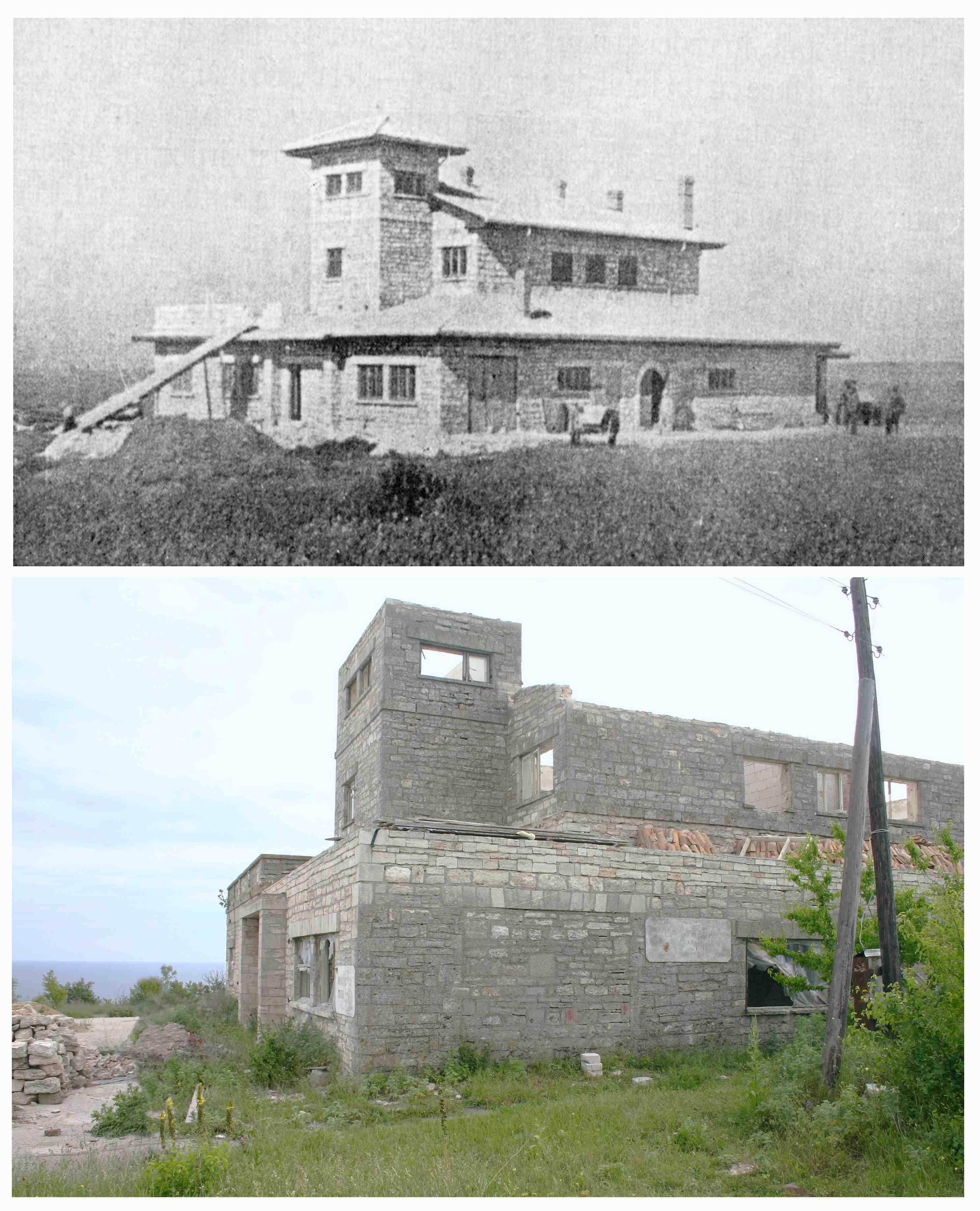 Station de recherches de l'Institut des ressources halieutiques de Varna, au cap Kaliakra en Bulgarie, en 1946 et en 2006